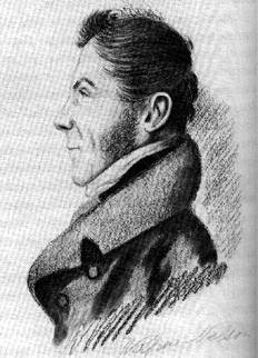 Dessin représentant Wolfred Nelson. Dessiné par le leader Patriote Jean-Joseph Girouard (1795-1855) durant sa propre incarcération à la prison au Pied-du-Courant, à l'hiver de 1838.